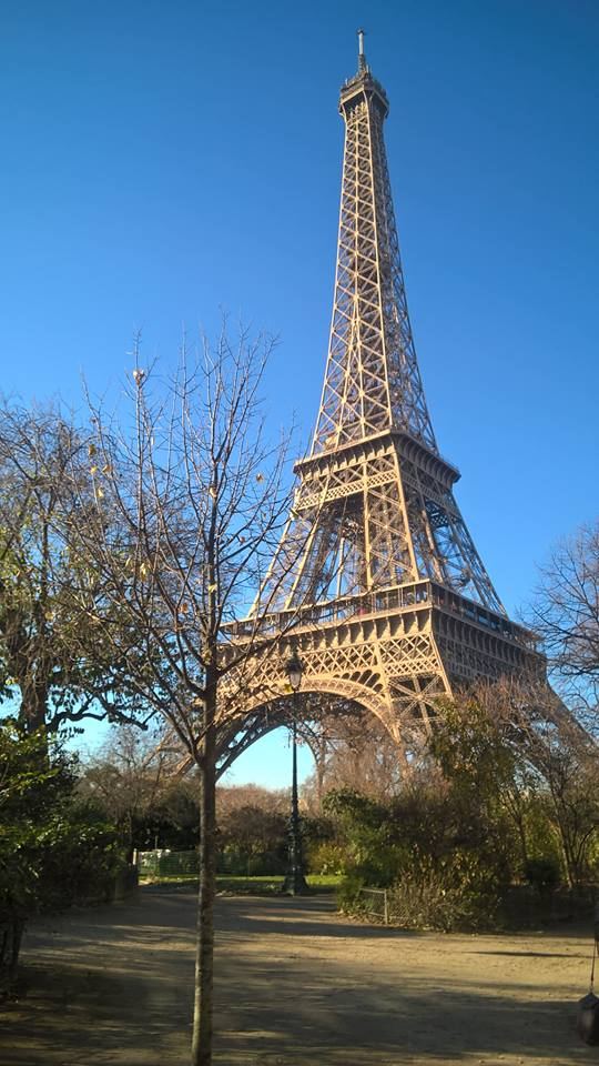 La Tour Eiffel (Paris, 29/11/2016).